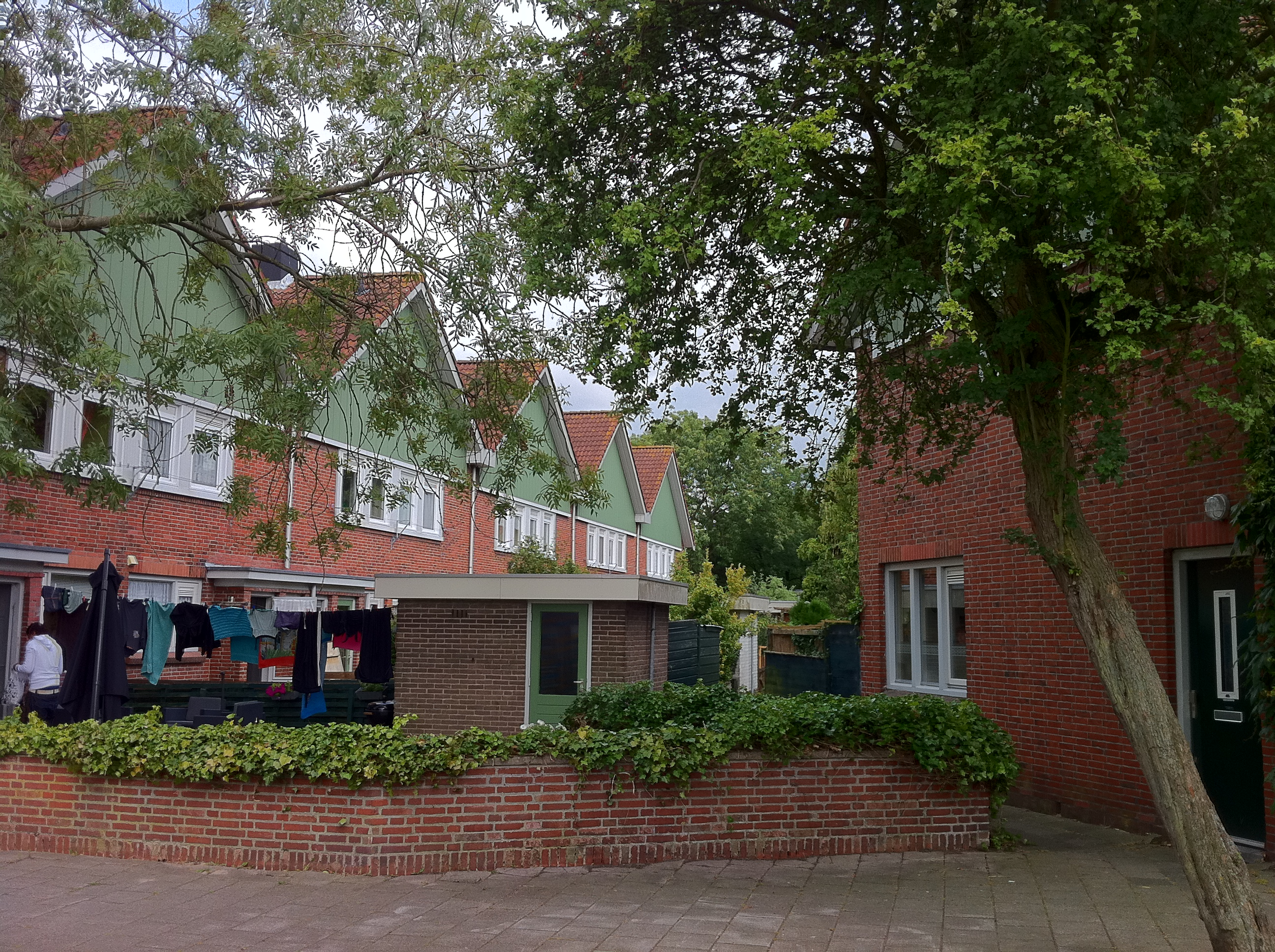 Tuindorp Buiksloot Amsterdam-Noord juli 2011